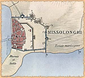 Les fortifications de Missolonghi lors du siège. Plan du XIXe siècle.